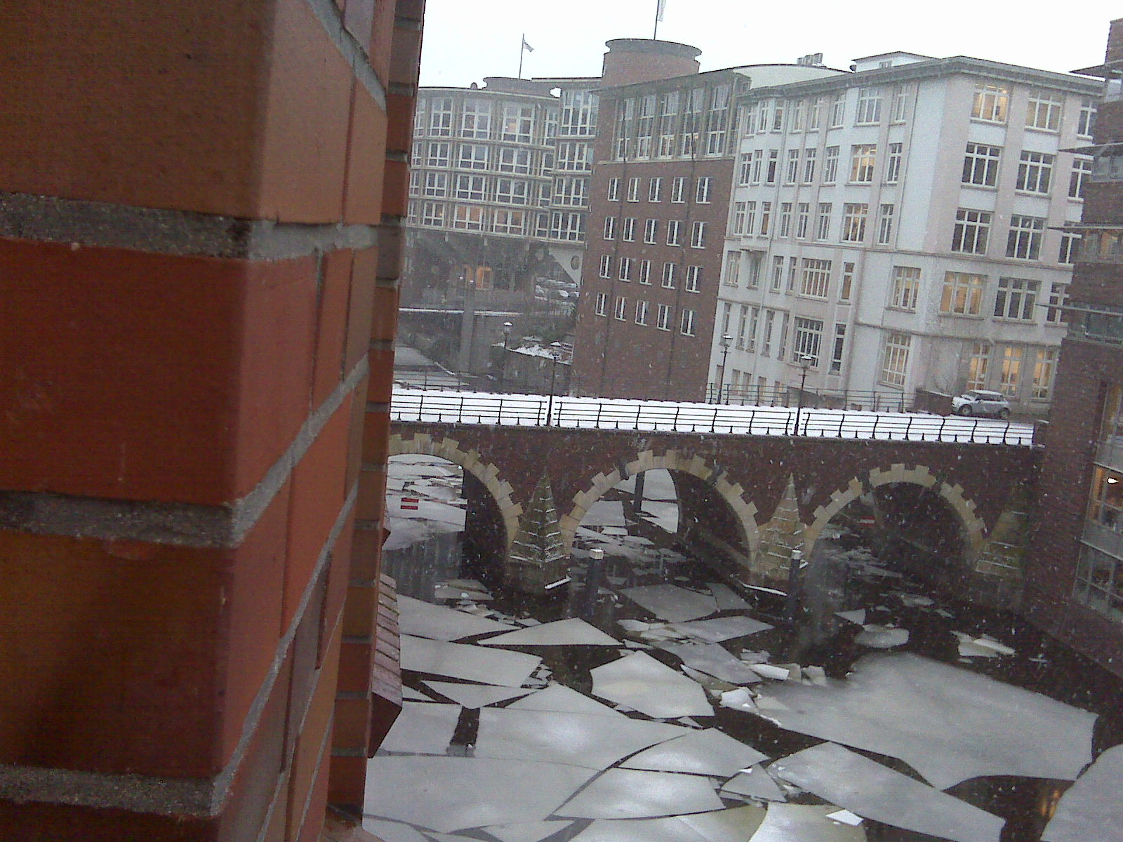 Ellerntorsbrücke in Hamburg bei Eisgang